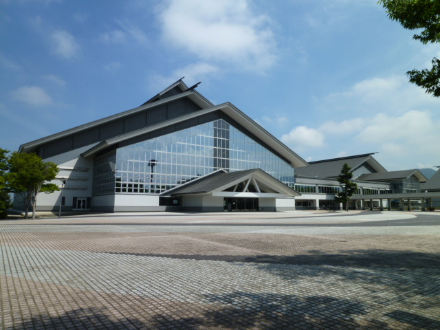 山形市総合スポーツセンター（山形市落合町）